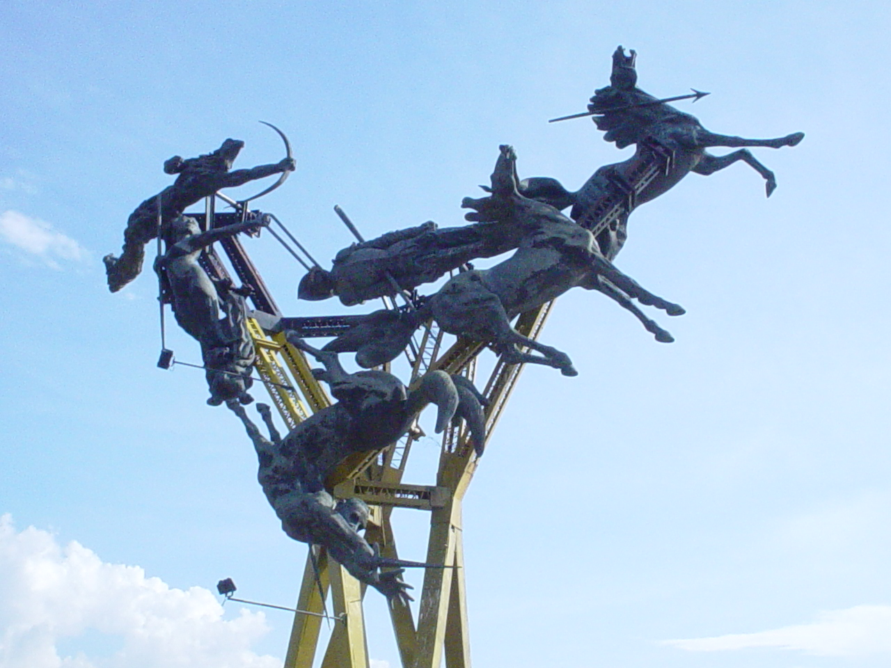 Monumento a la Cacica Gaitana de Rodrigo Arenas Betancur. Neiva, Colombia.